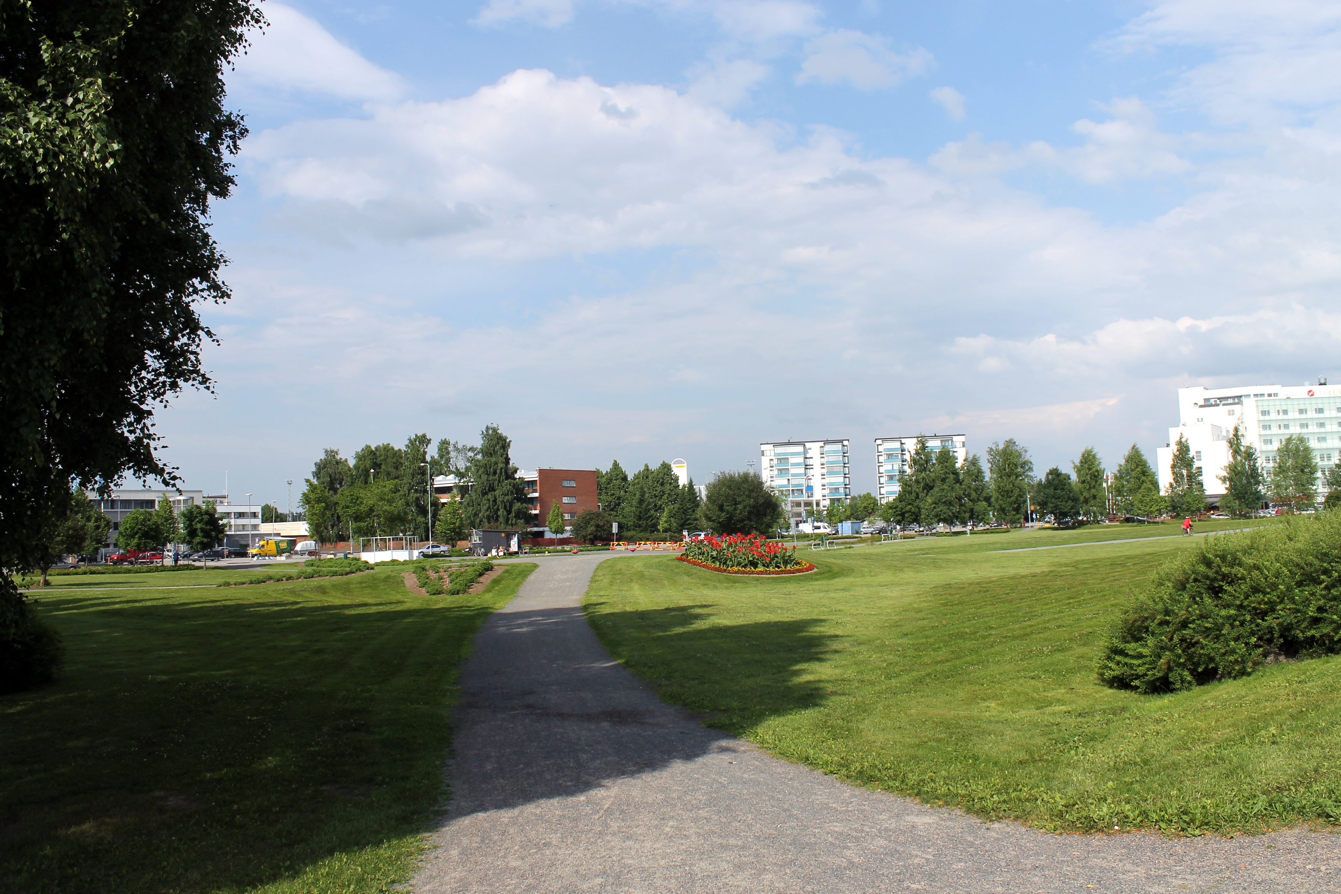 Lakeuden ristin puisto kesäkuussa 2013